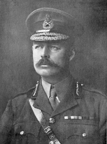 Huntly Ketchen - Project Gutenberg eText 18963